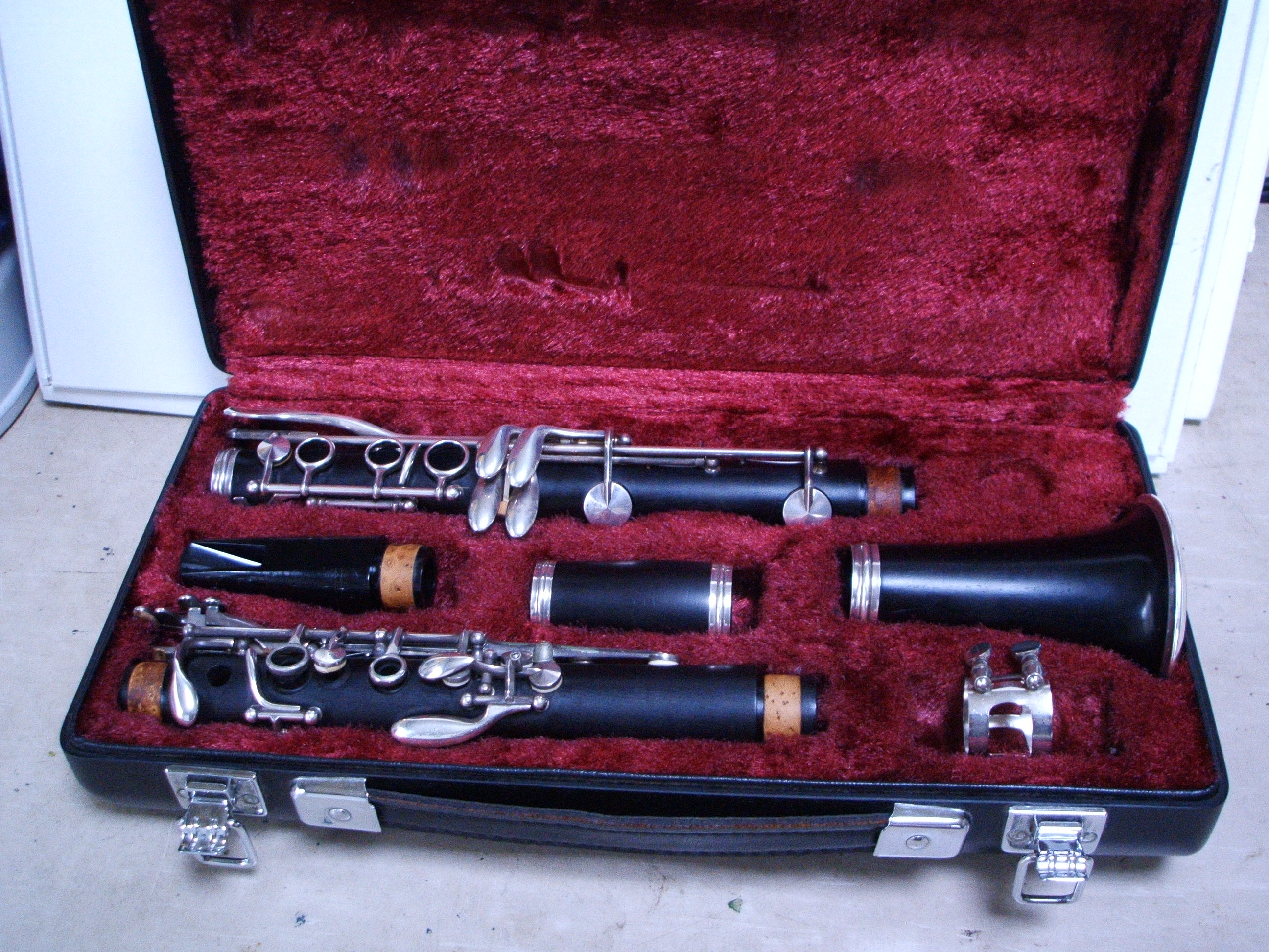 クラリネット